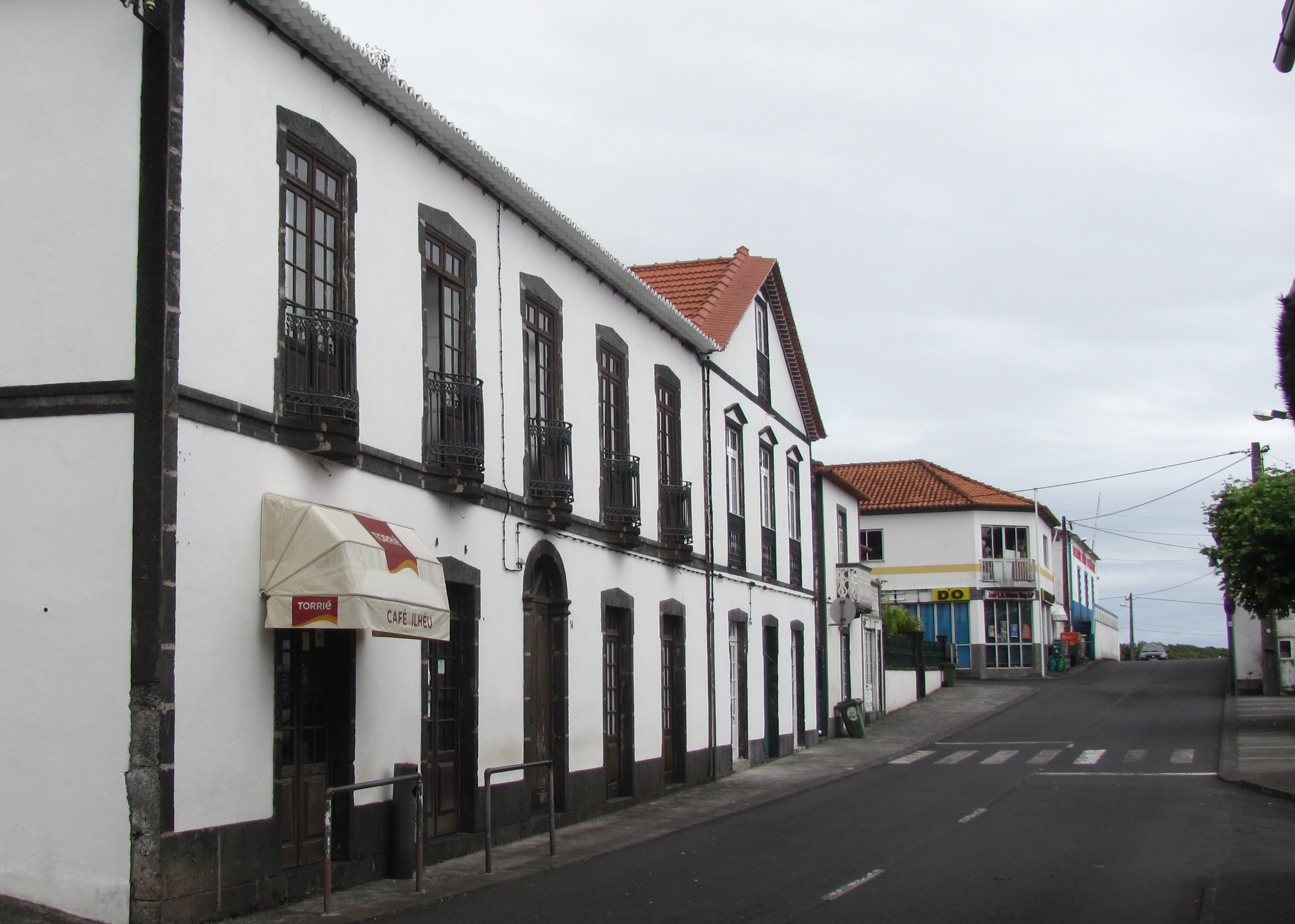 Hauptstraße in Urzelina, Insel S. Jorge, Azoren, Portugal